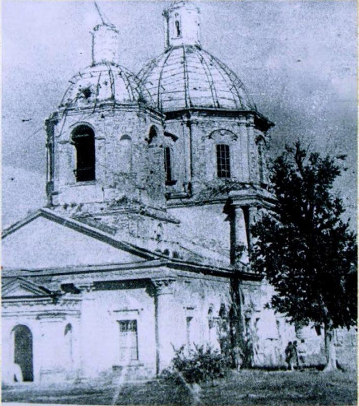 Храм Донской иконы Божьей Матери в станице Старочеркасской